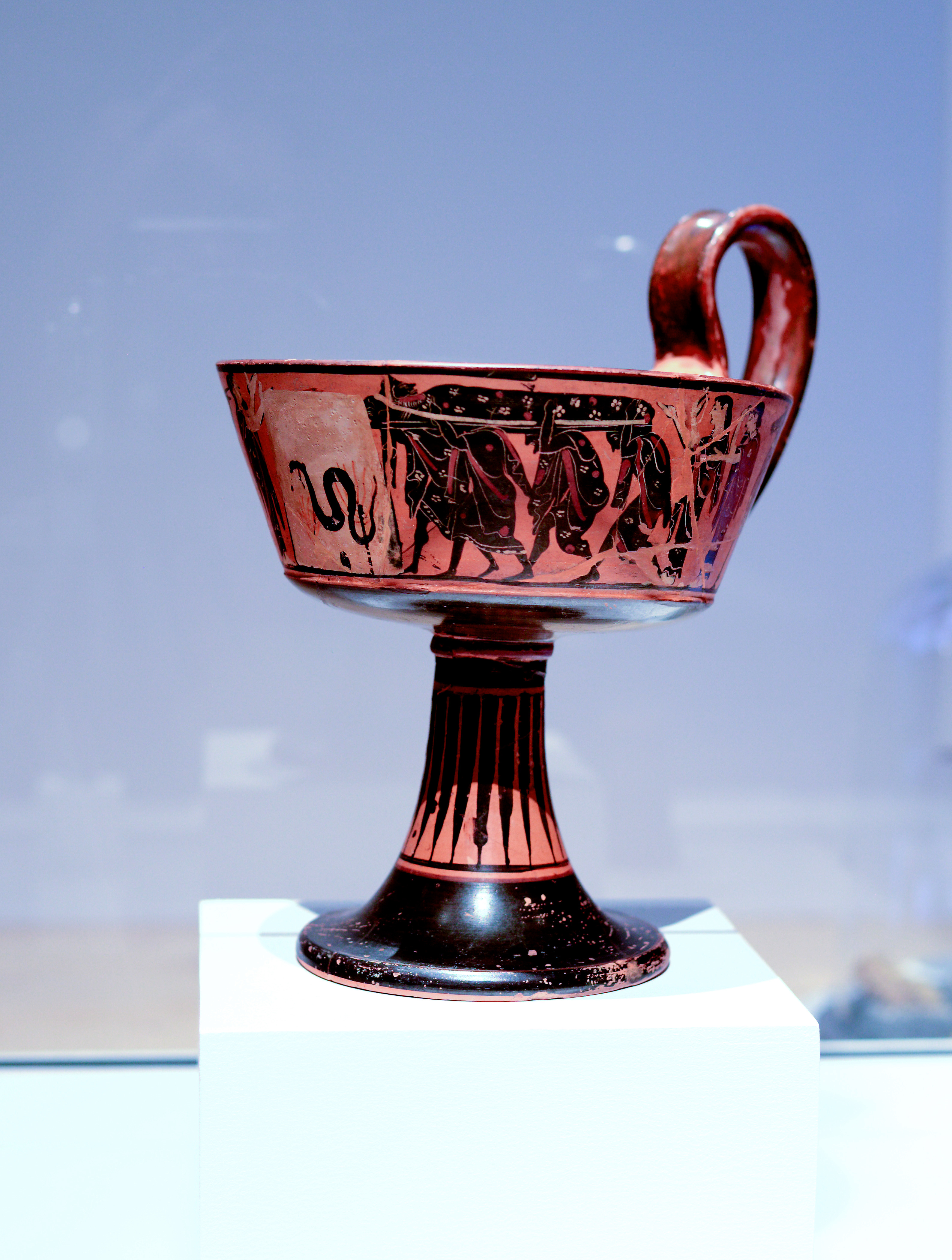 Canthare à une anse – Rituels Grecs – inv. 353 – Musée Saint-Raymond